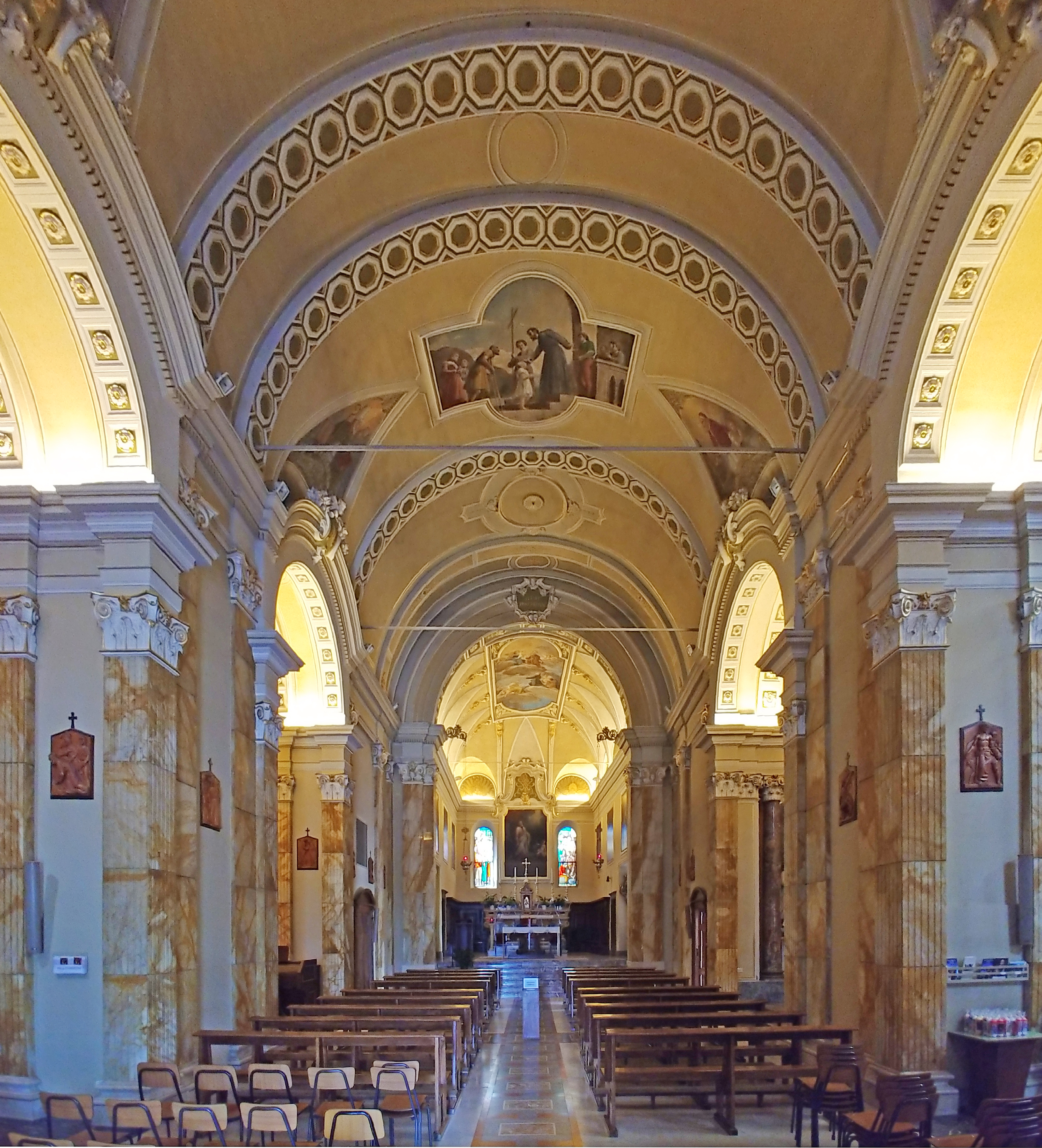 Interno.